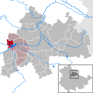 Schwerstedt in Thuringia - District Sömmerda